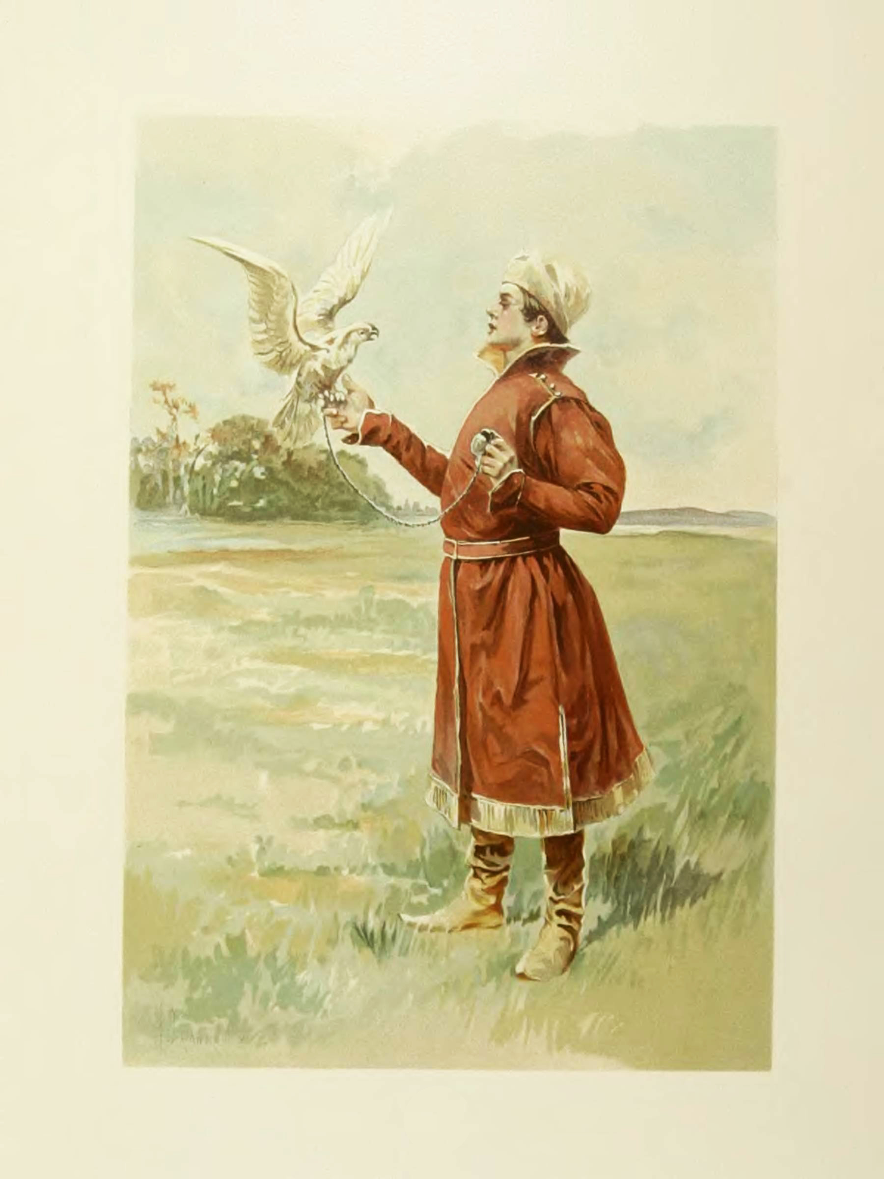 «Falconer» Сокольник